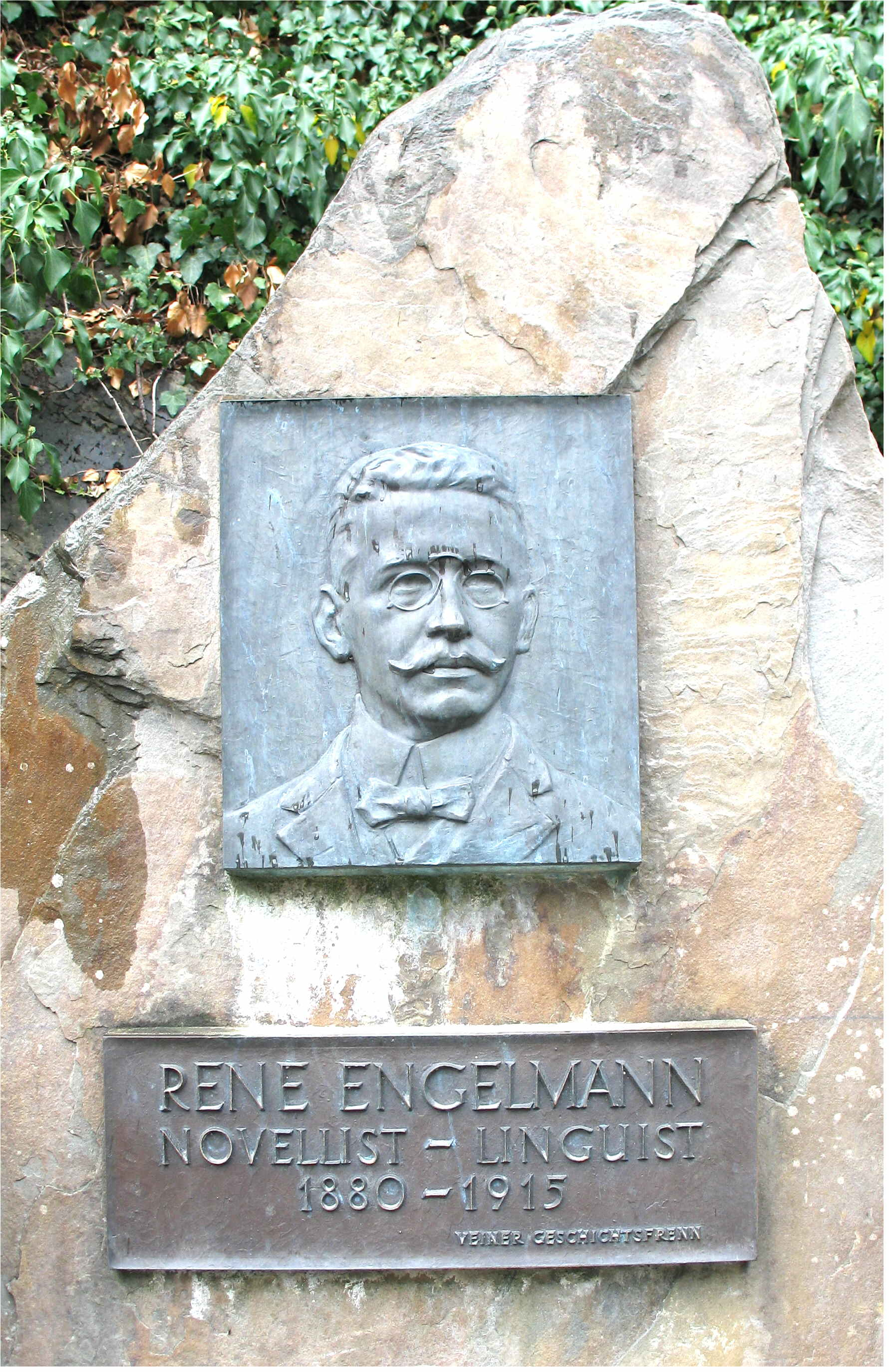 Gedenkstee fir de René Engelmann zu Vianen.